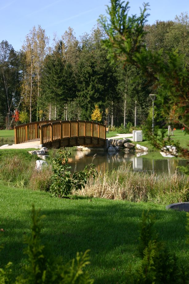 Parc de l'abbaye de la ville de Lure